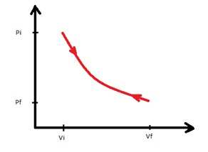 Diagrama de um processo reversível